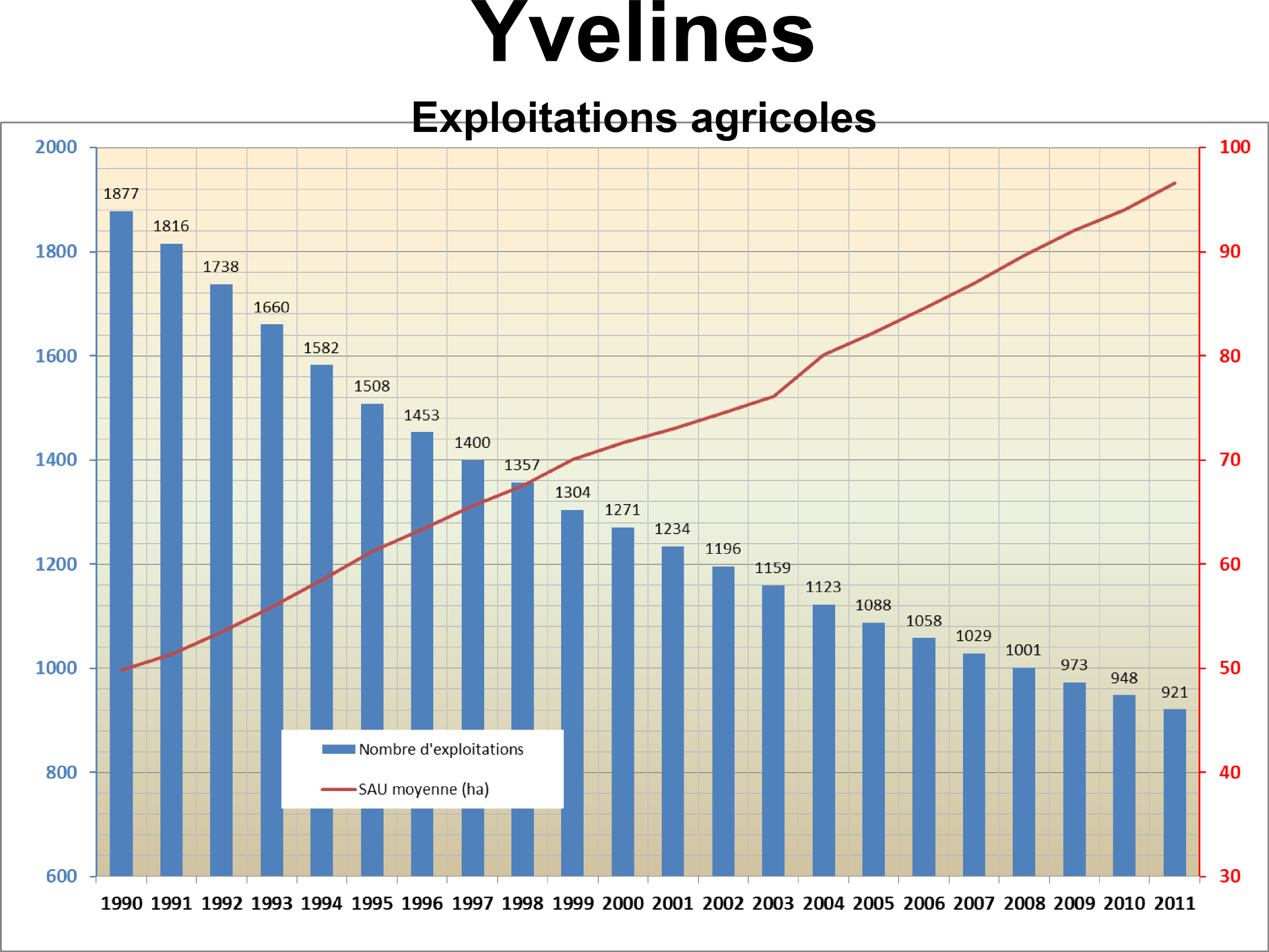 Évolution du nombre d'exploitations agricoles du département des Yvelines (France) et de leur surface agricole utile moyenne. (source : Agreste)